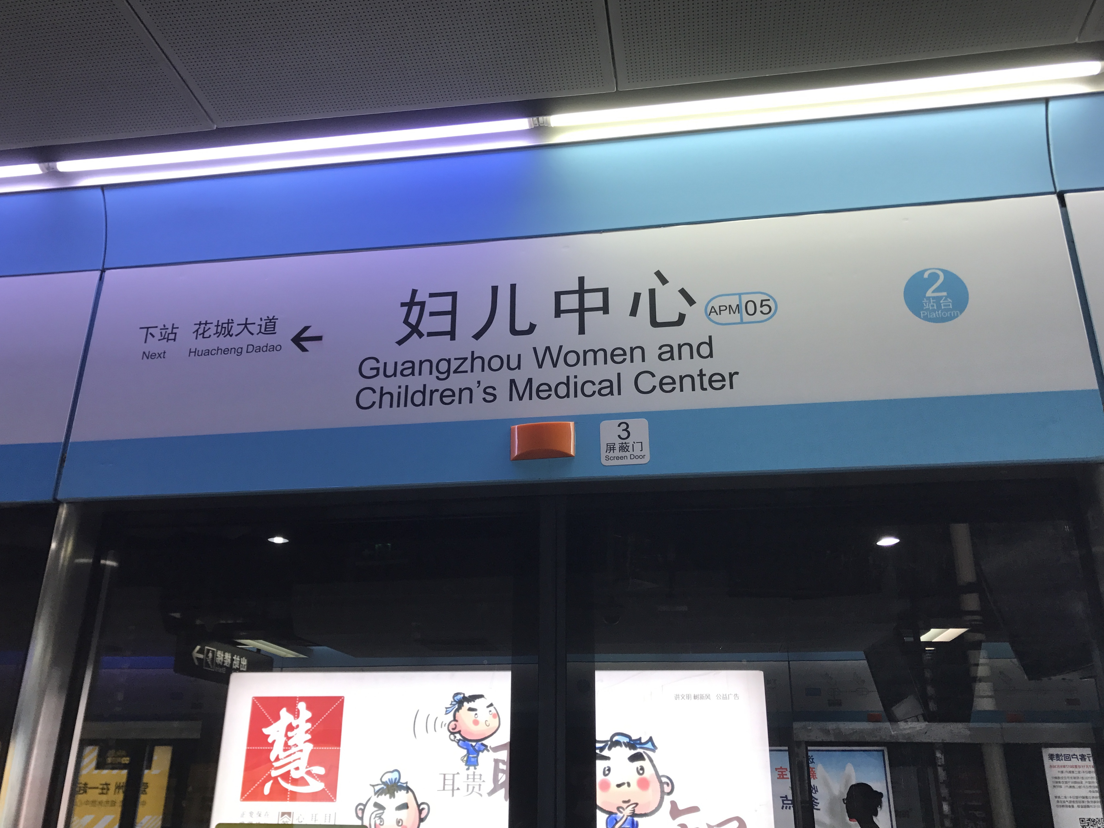 婦児中心駅の駅名標